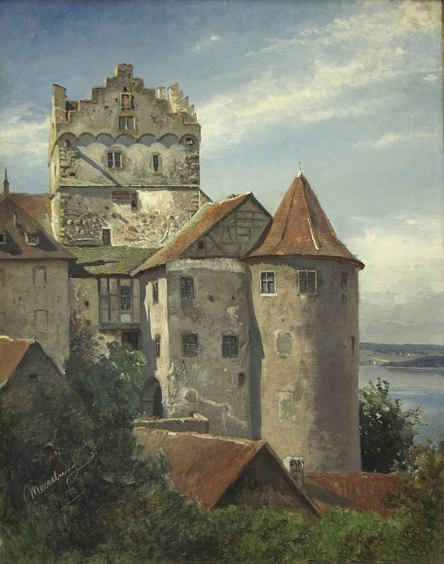 "Burg Meersburg am Bodensee", unten rechts monogrammiert "A.S." und links datiert "2 25/7 (18)72", Öl auf Malkarton, 50 x 39 cm